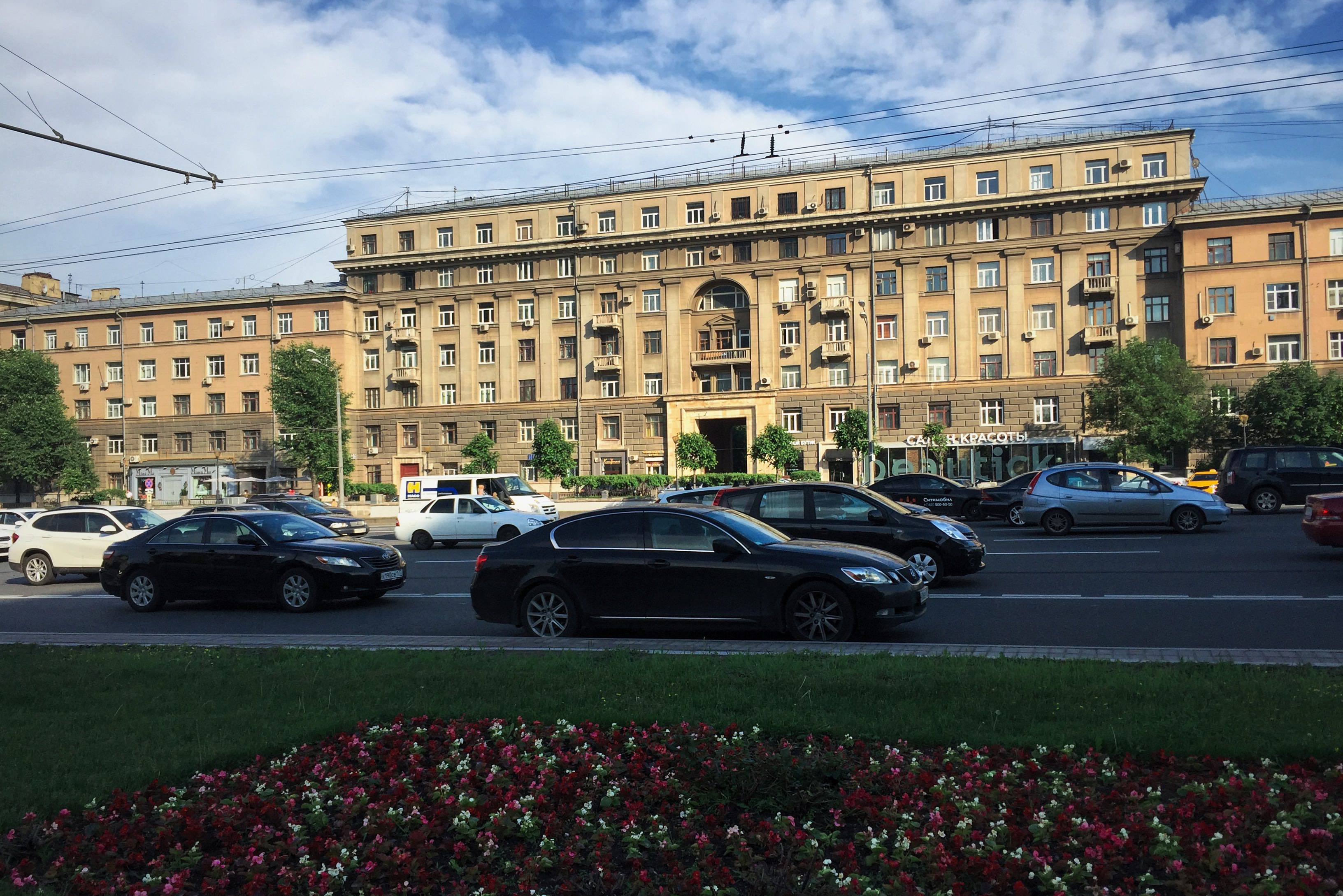 Кутузовский проспект, 33. 1937, архитекторы И.З. Вайнштейн и В.М. Муравьев.